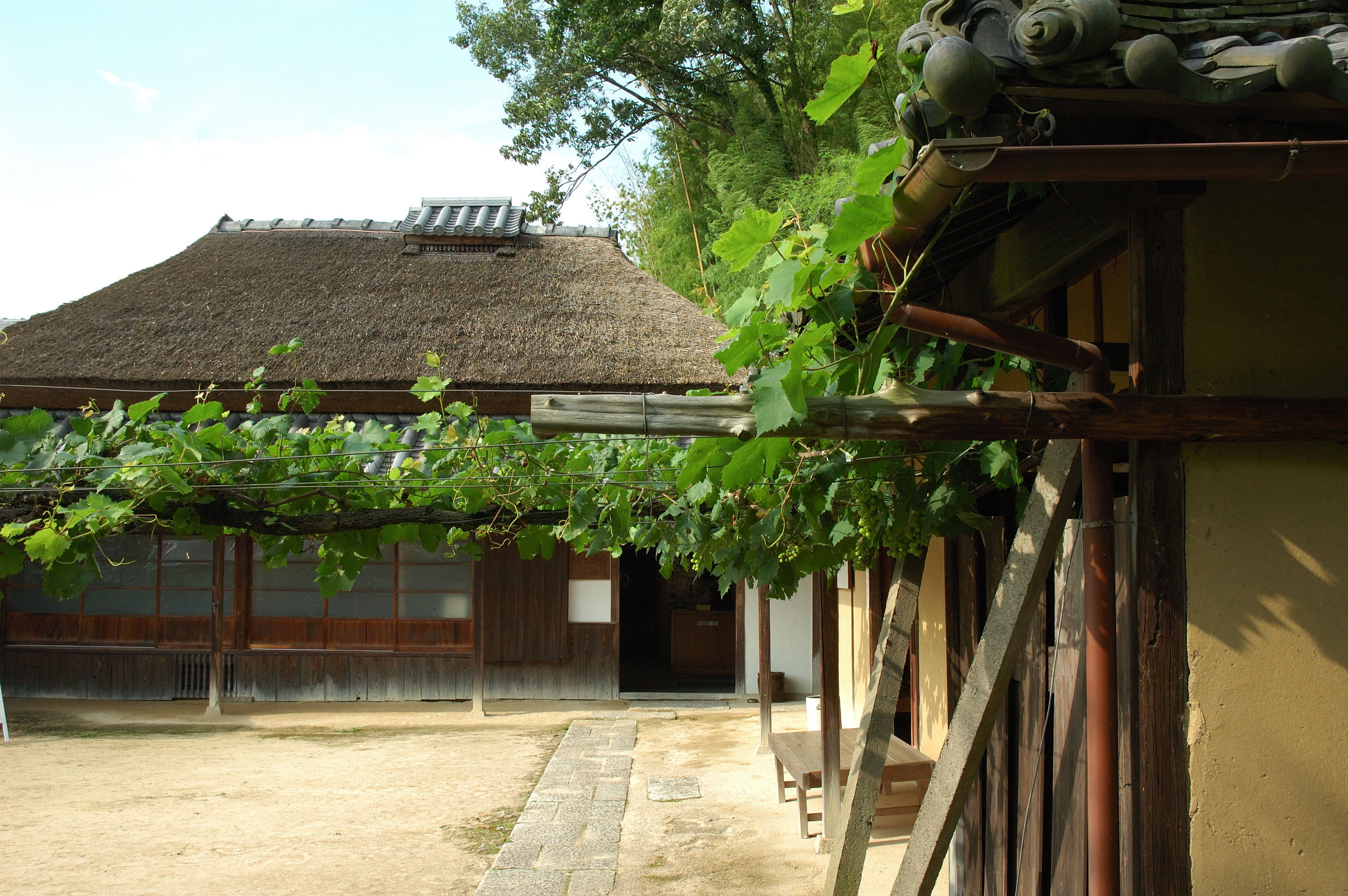 Yumeji Takehisa's parents' house